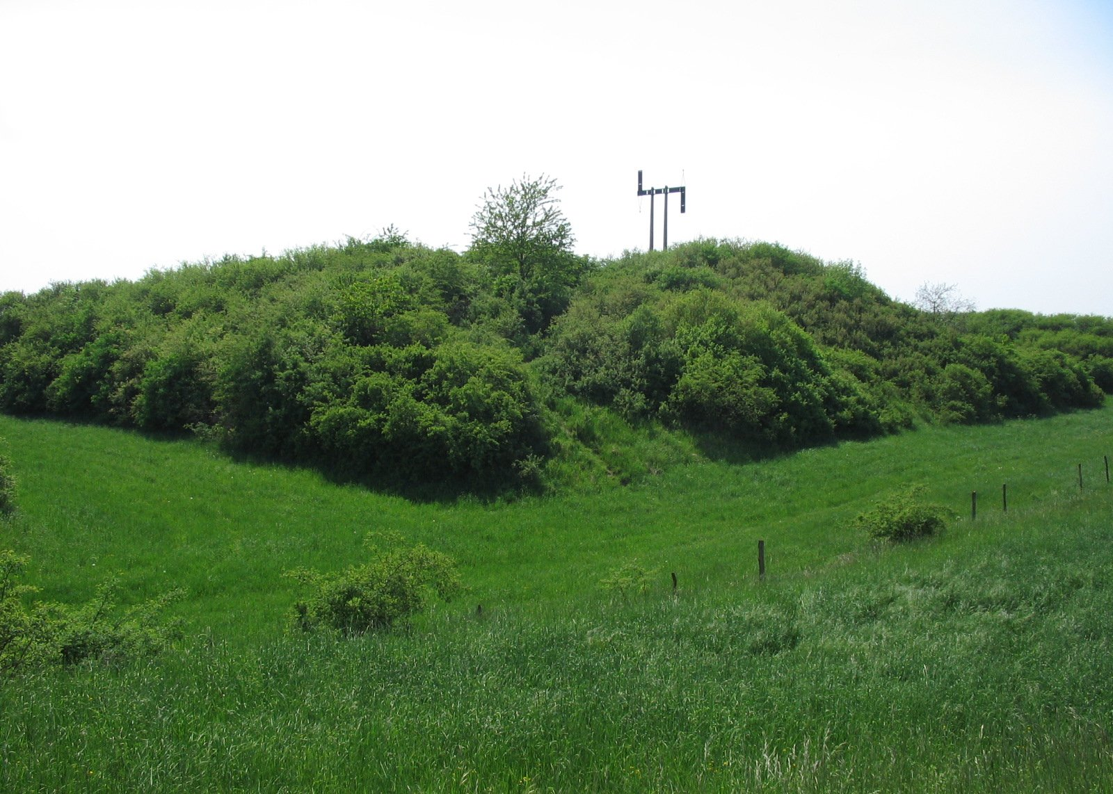 Emplacement de l'ancien château du Kochersberg. Il ne reste que les traces du fossé au premier plan. Tour chappe au sommet.